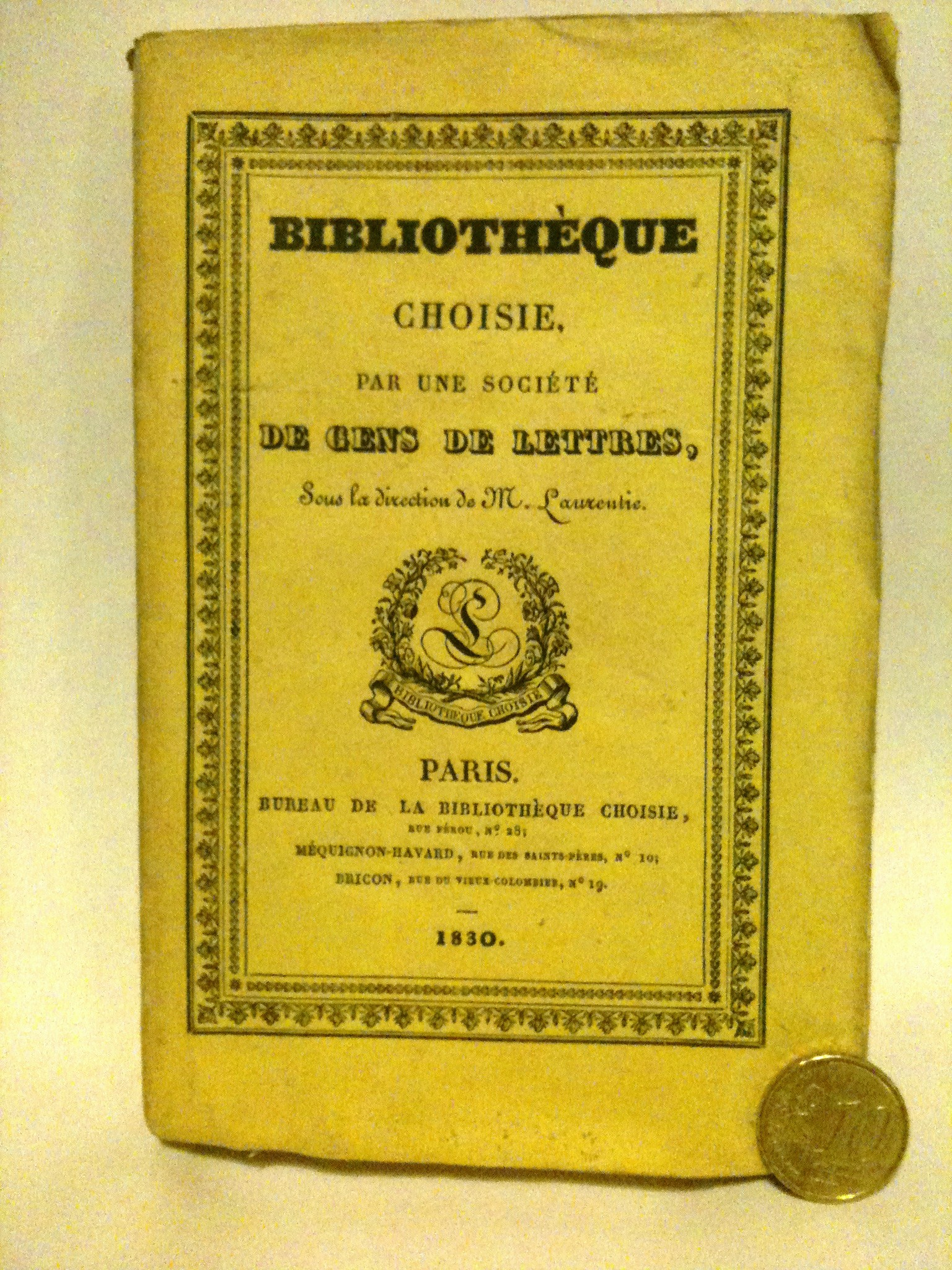 Choix de Plutarque, volume du Bureau de la Bibliothèque choisie par une société de gens de lettres, dirigée par M. [Pierre-Sébastien] Laurentie, Paris, 18 rue Férou, 332 pages, dim. : 9,5 x 15 cm.